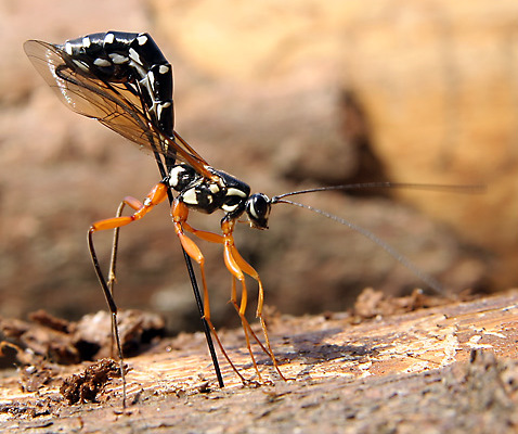 Rhyssa persuasoria (Zgłębiec trzepiennikowaty)